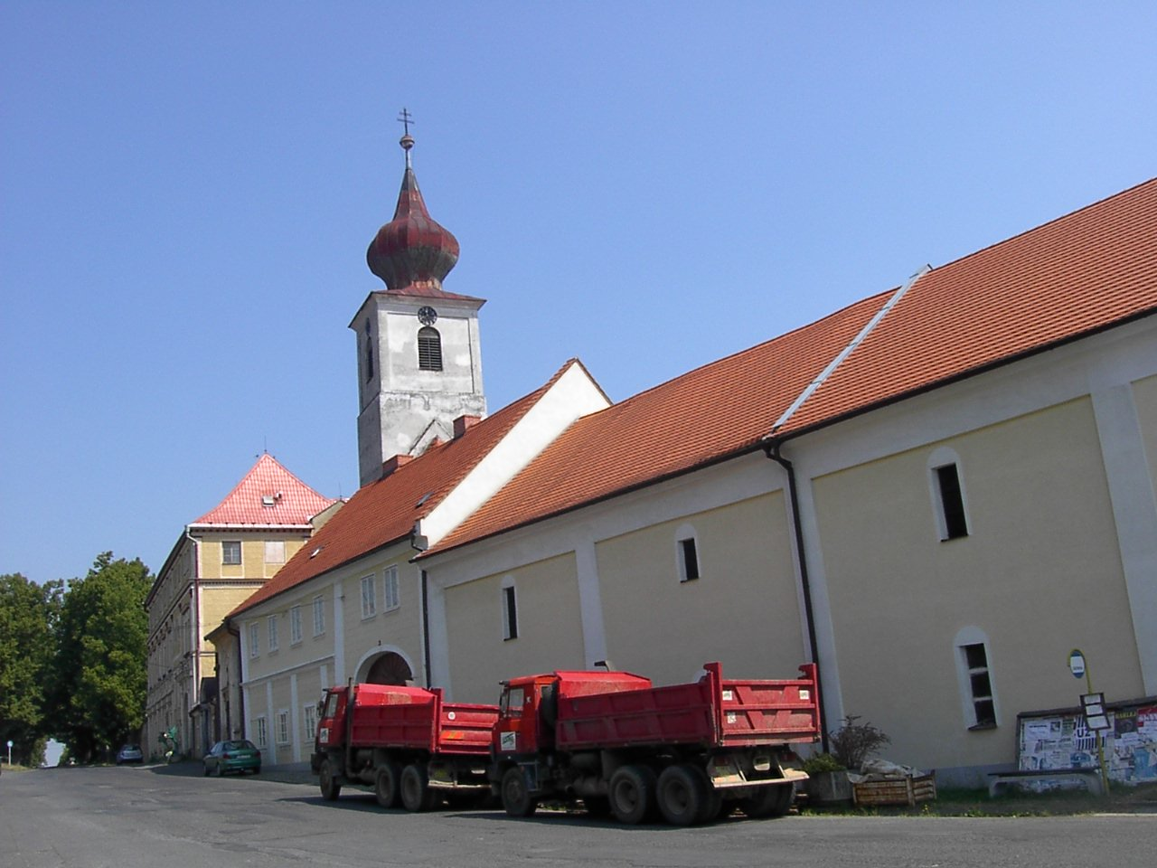 Zámek s obecním úřadem a poštou v Trhanově.